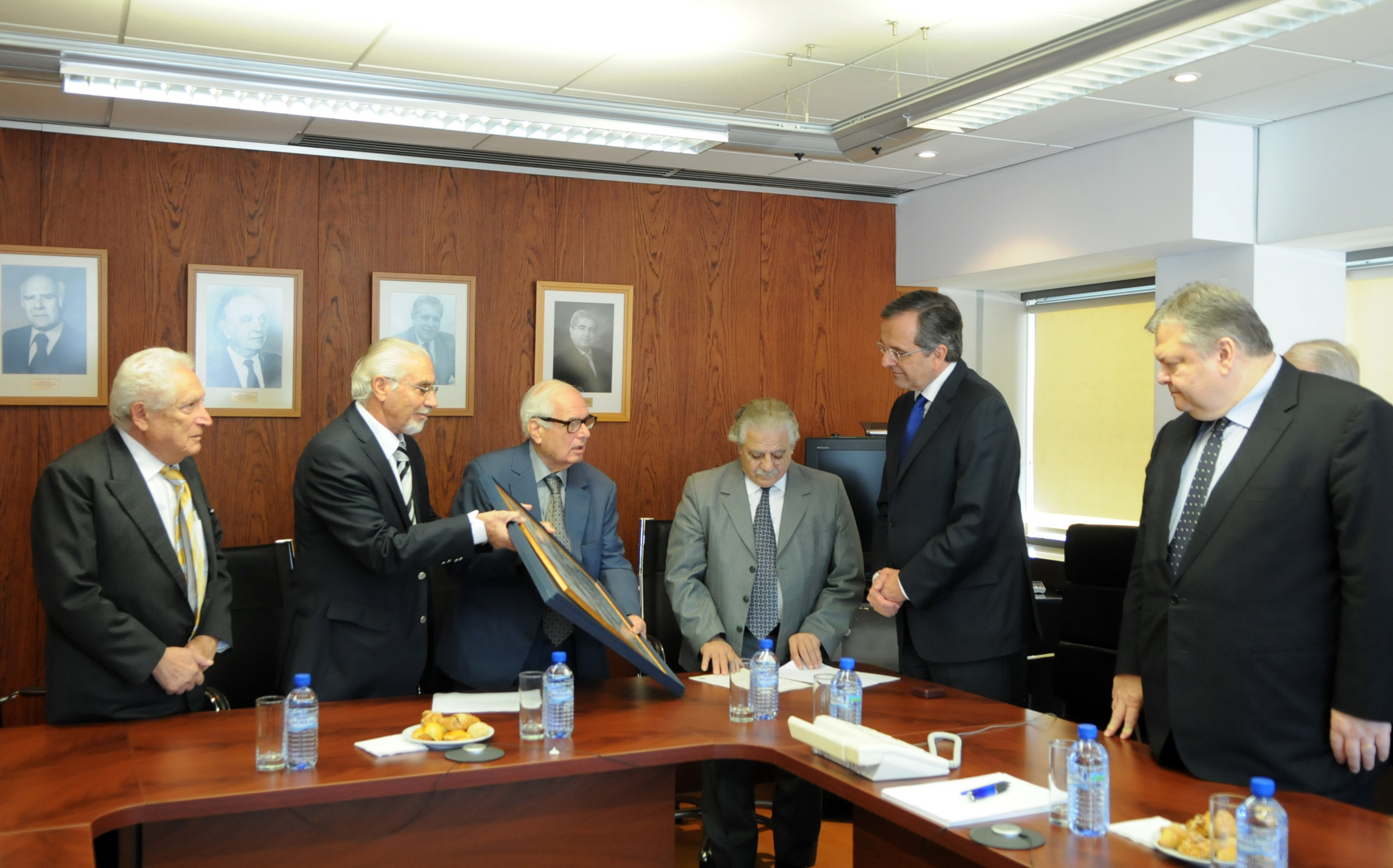 Επίσκεψη πρωθυπουργού Α. Σαμαράς στα γραφεία της Εθνικής Οργάνωσης Κυπρίων Αγωνιστών (ΕΟΚΑ), την Παρασκευή 07 Νοεμβρίου 2014, στη Λευκωσία. ΠΗΓΗ: ΑΠΕ-ΜΠΕ